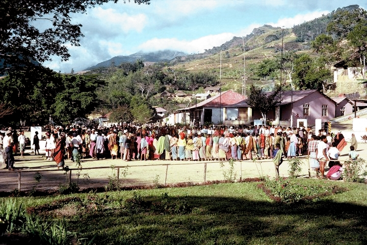 Festa em Atsabe